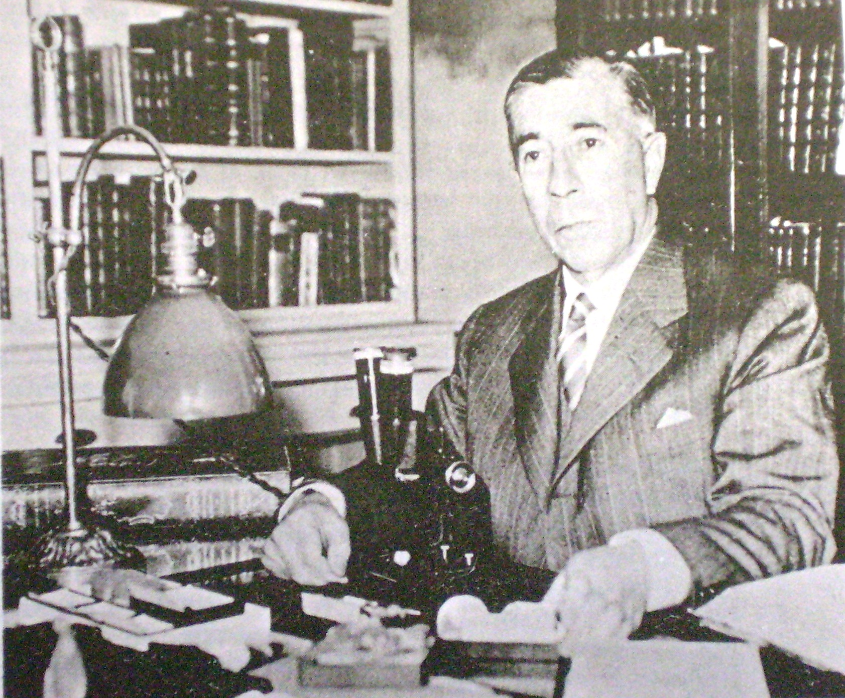 Martín Doello Jurado (1884—1948)